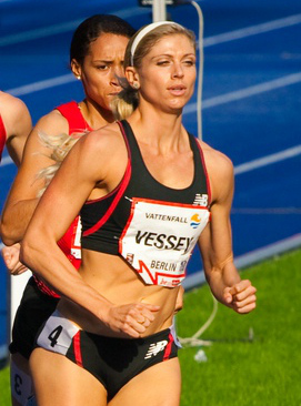 ISTAF 2011, 800m der Frauen, Maggie Vessey